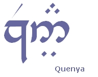 Quenya － 以昆雅談格瓦文字書寫